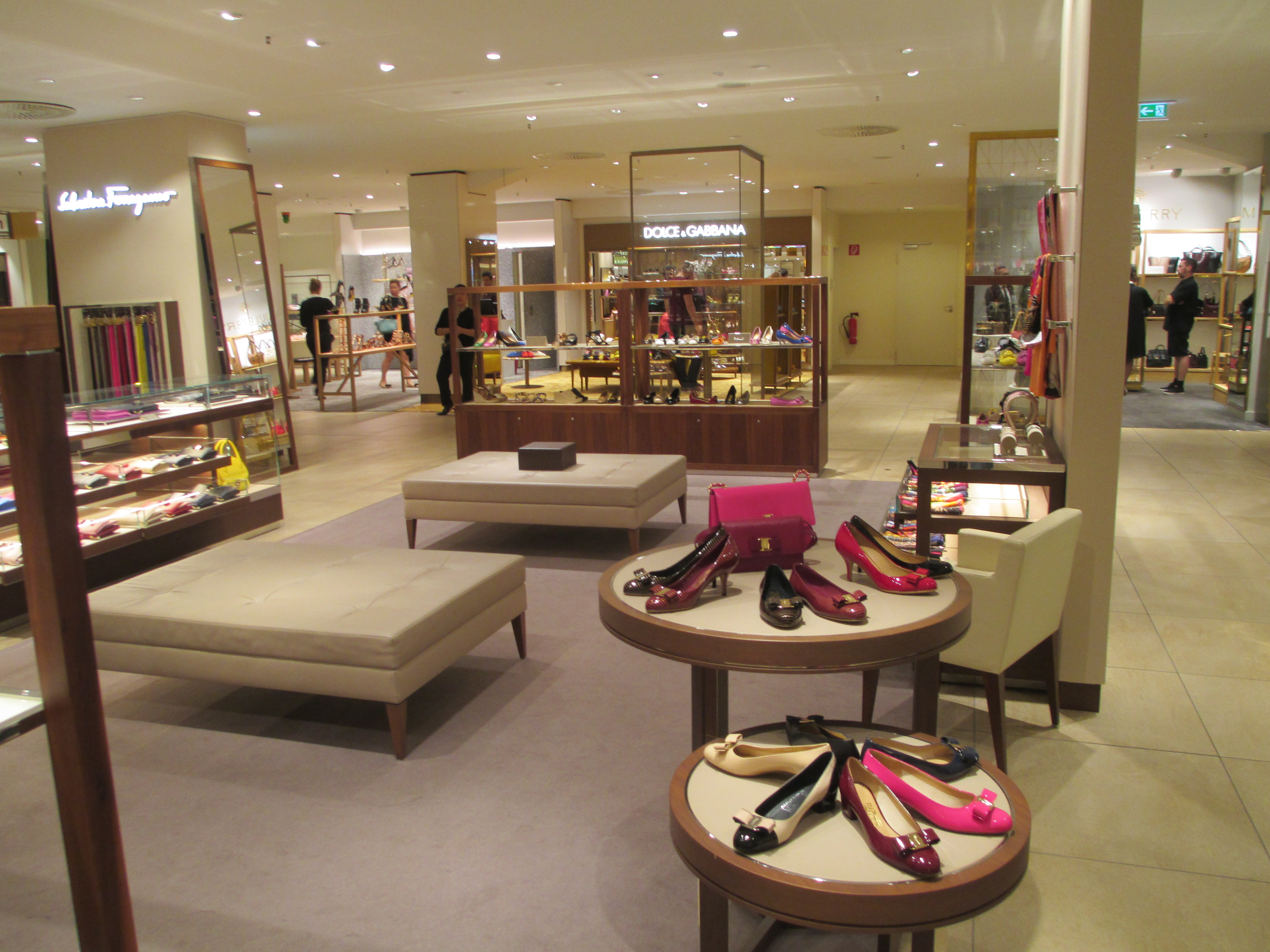 קה דה וה